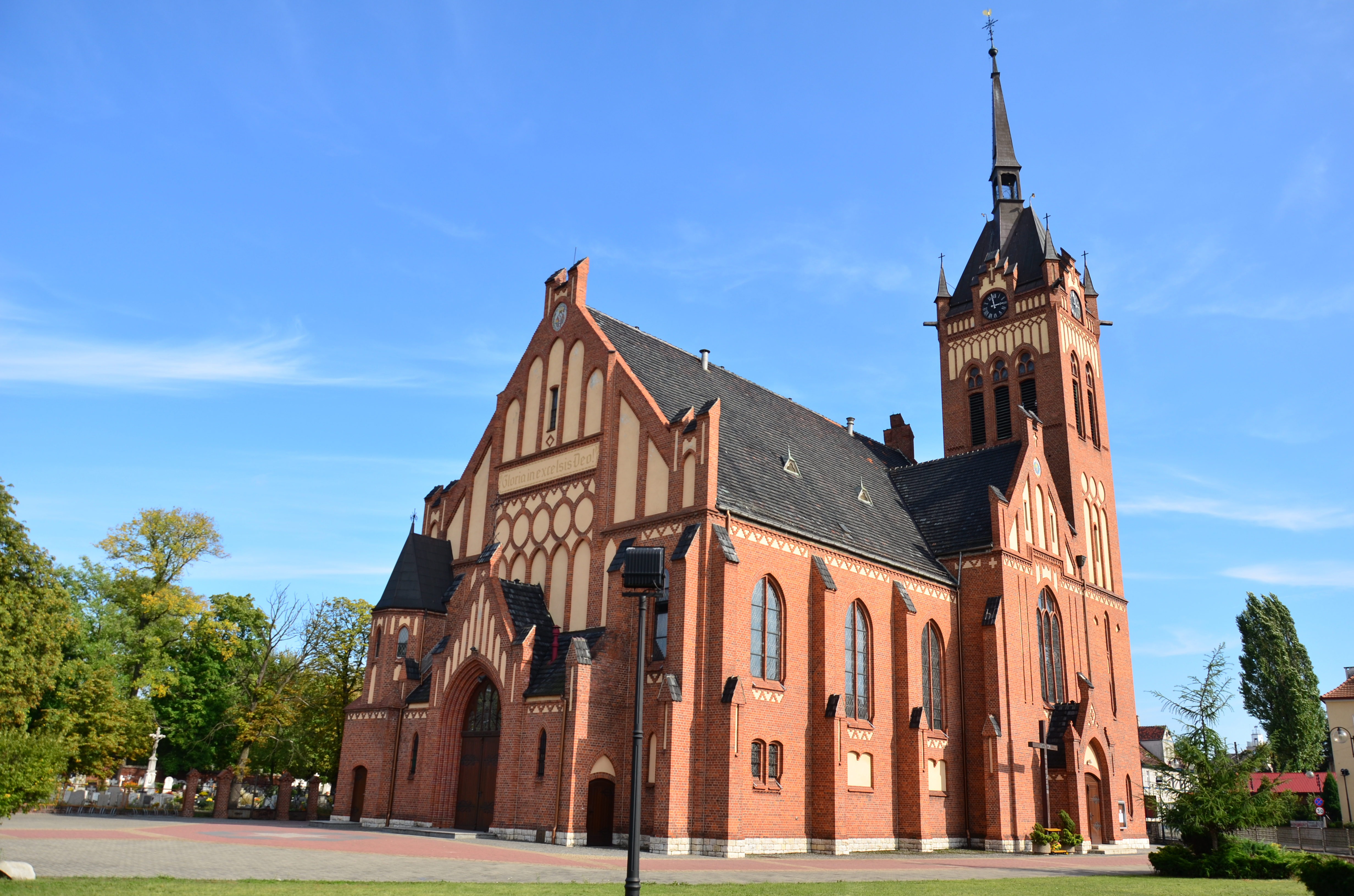 Kędzierzyn-Koźle, ul. Judyma 1 - kościół parafialny pw. św. Mikołaja